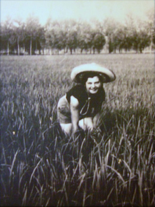 Photo d'une Mondina. Il s'agit de la photo d'une personne ayant travaillé comme mondina dans sa jeunesse. Argia Granuzzo l'a personnellement rencontrée dans sa maison de retraite au mur de laquelle était apposée la photo.